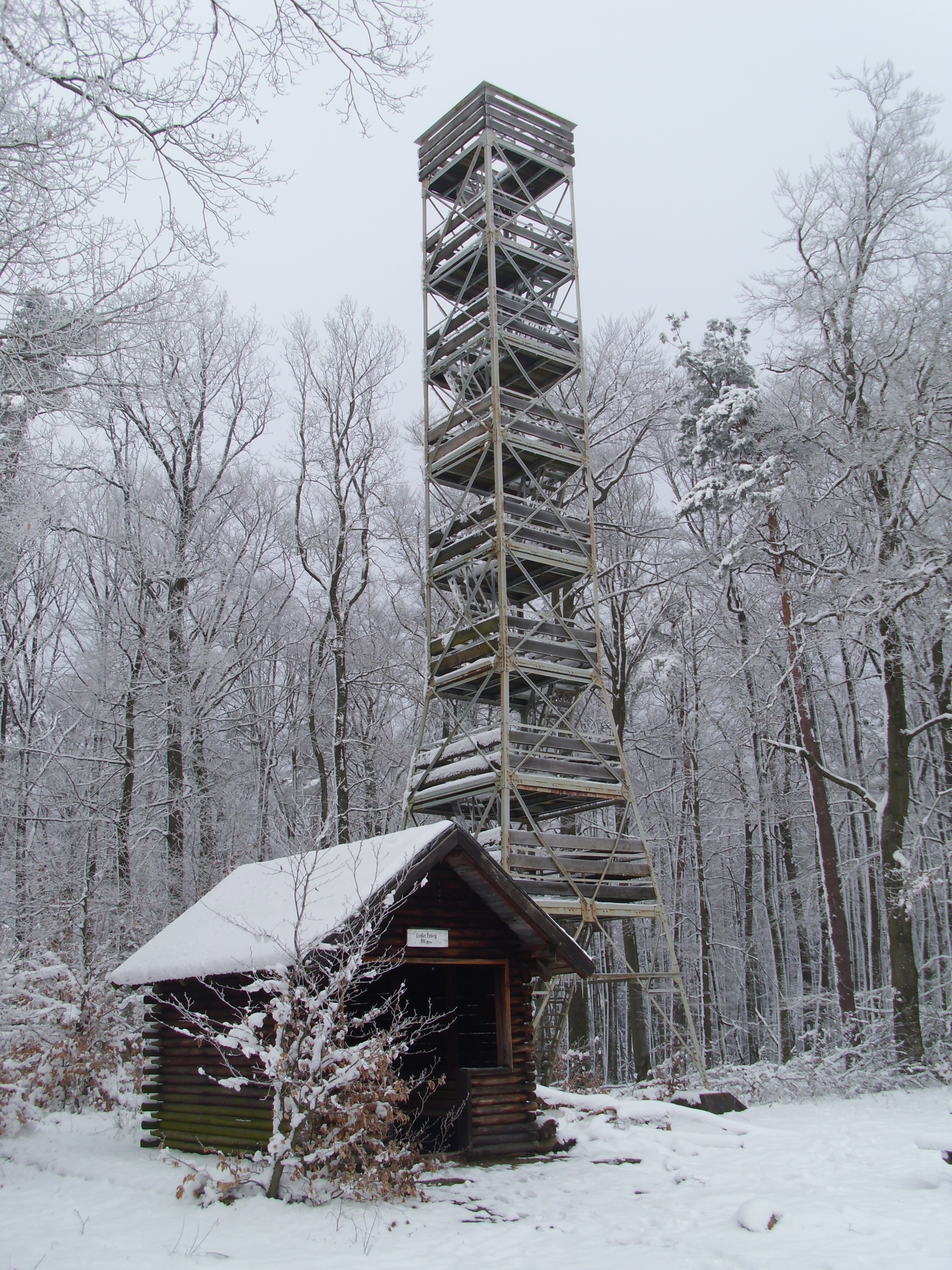 49° 7′ 27″ N, 7° 44′ 57″ O